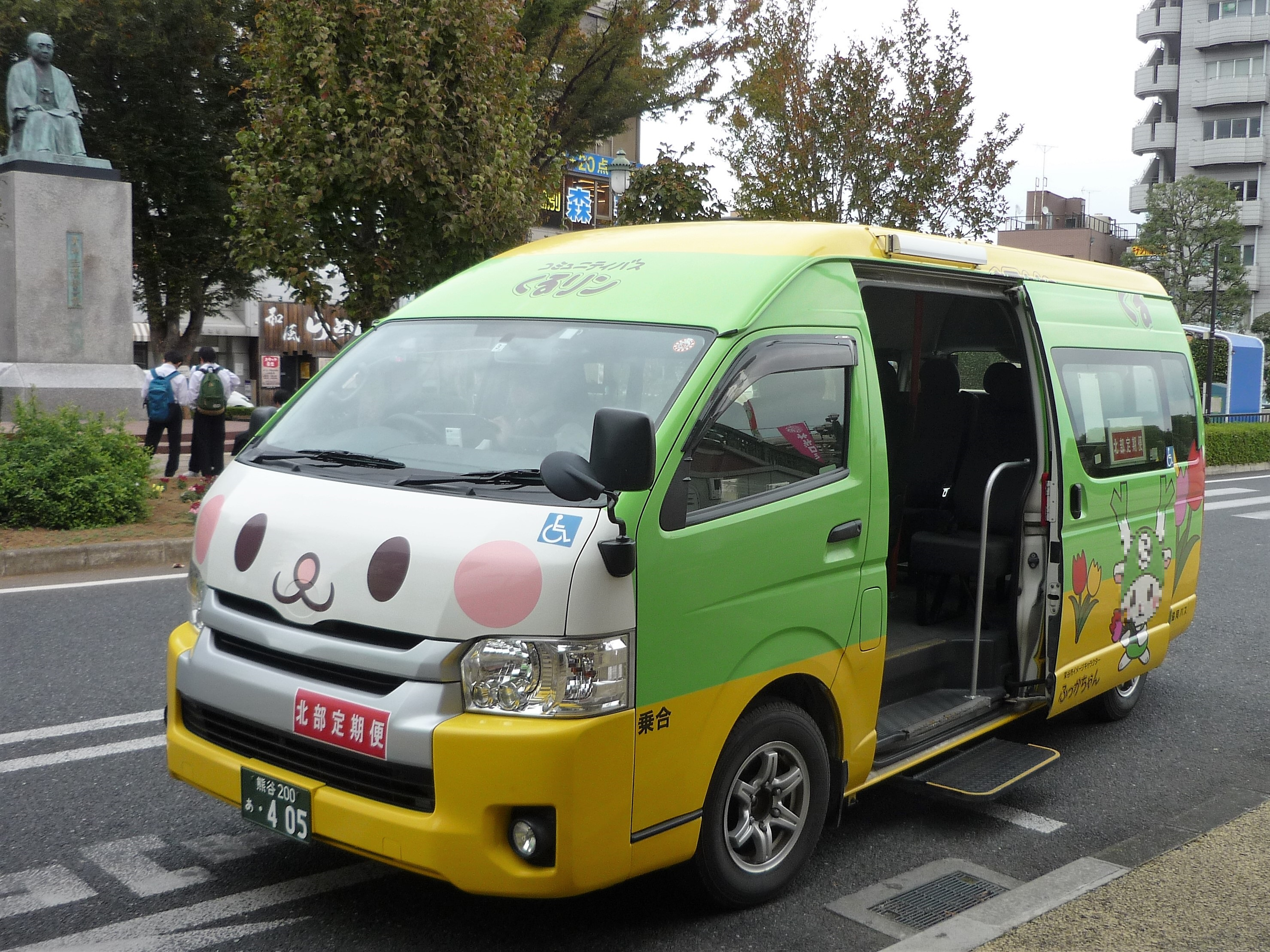 深谷市コミュニティバス「くるリン」北部定期便（深谷駅北口） Panasonic Lumix DMC-FS3